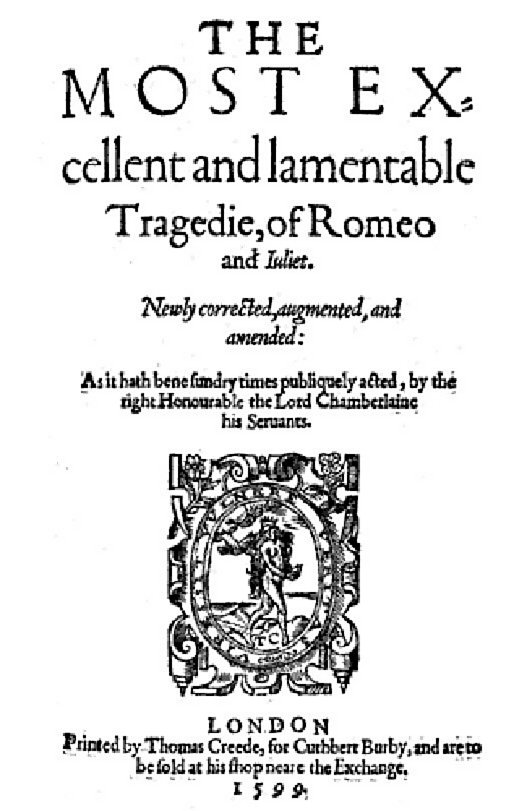 Édition de Roméo & Juliette de 1599.